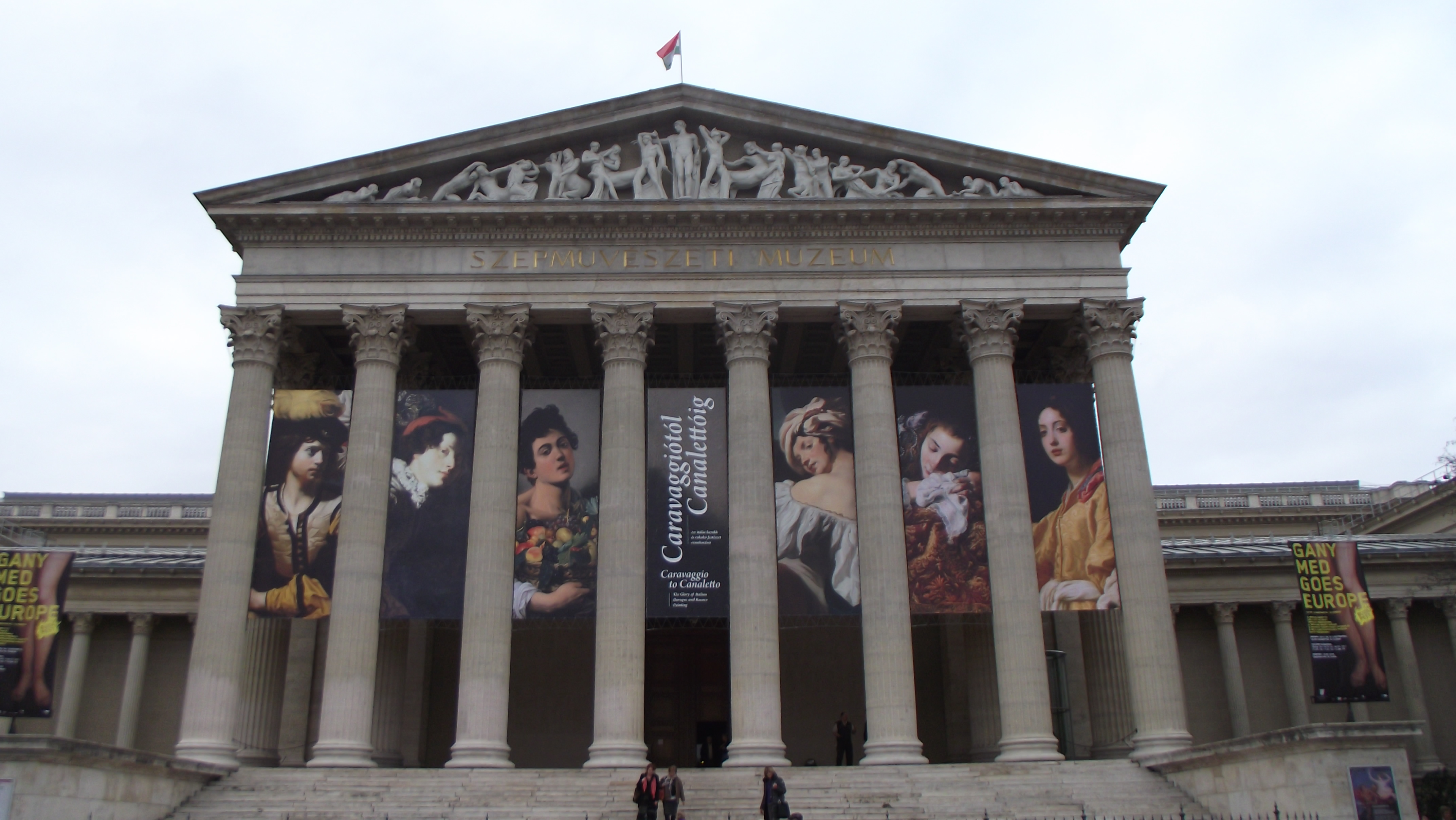 Budapesti Szépművészeti Múzeum